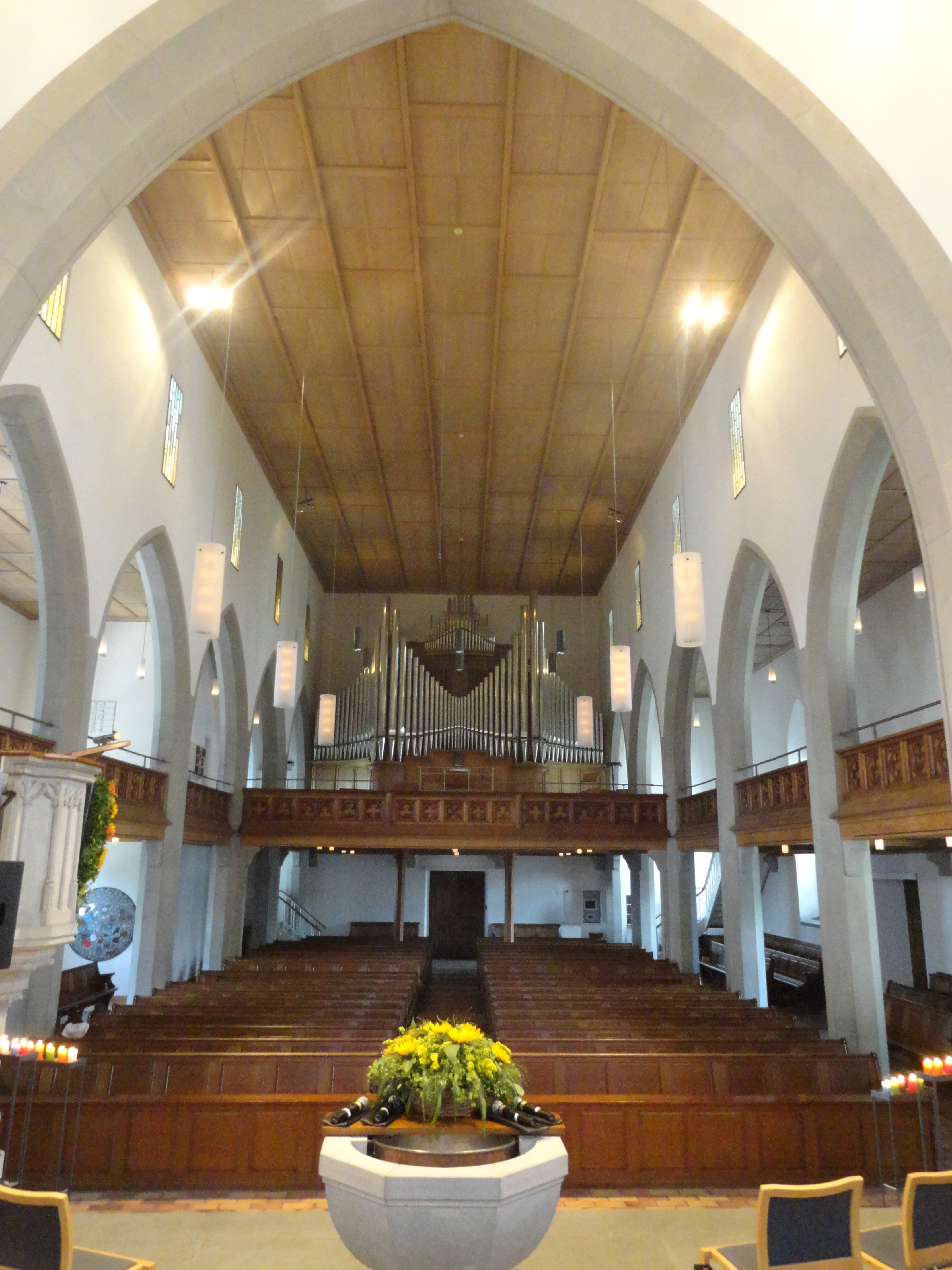 Reformierte Kirche Küsnacht Innenraum